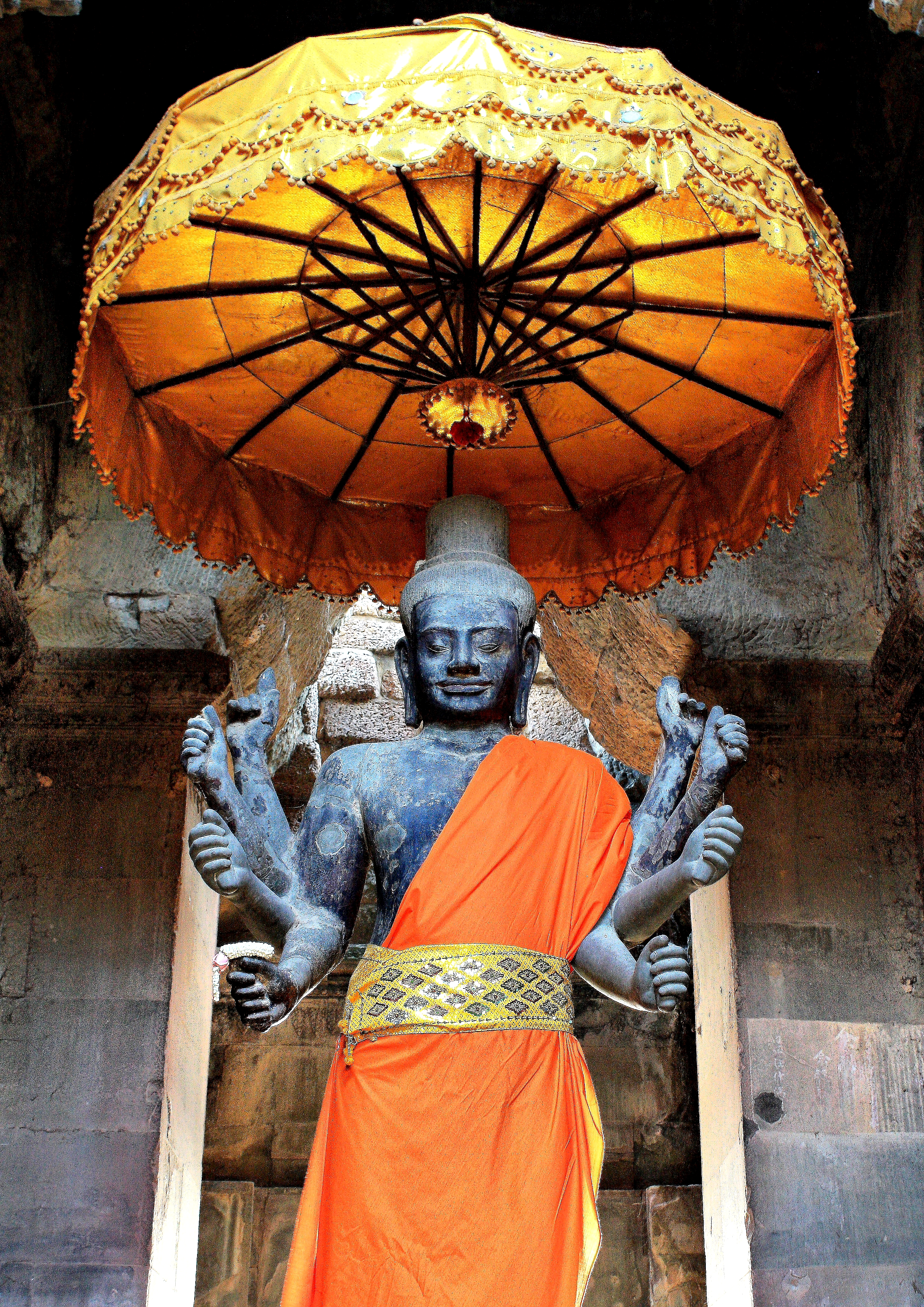 angkorwatstatue-2